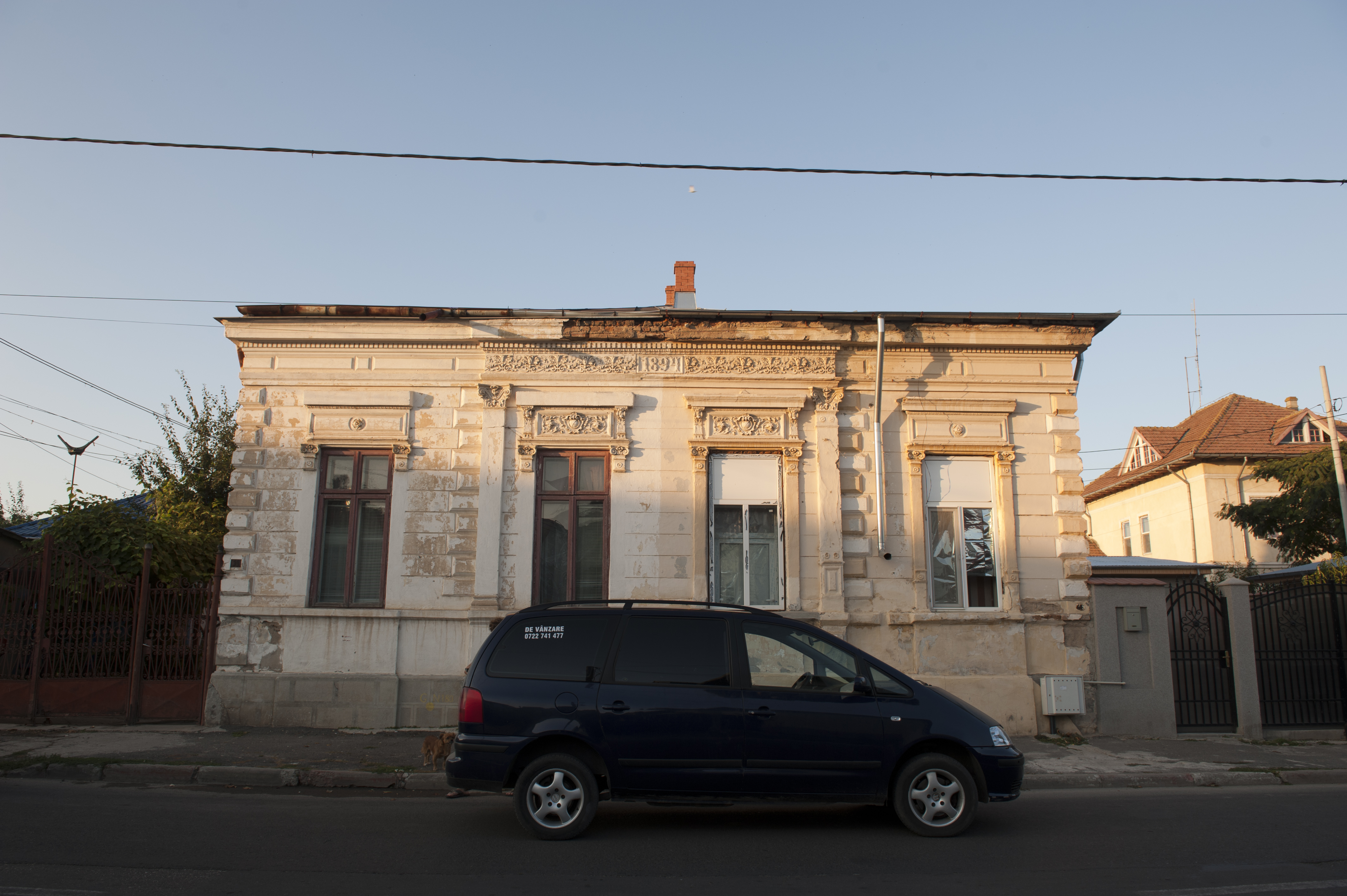 Str. Independentei nr. 39, Casa G-ral Bratulescu, construita în anul 1894